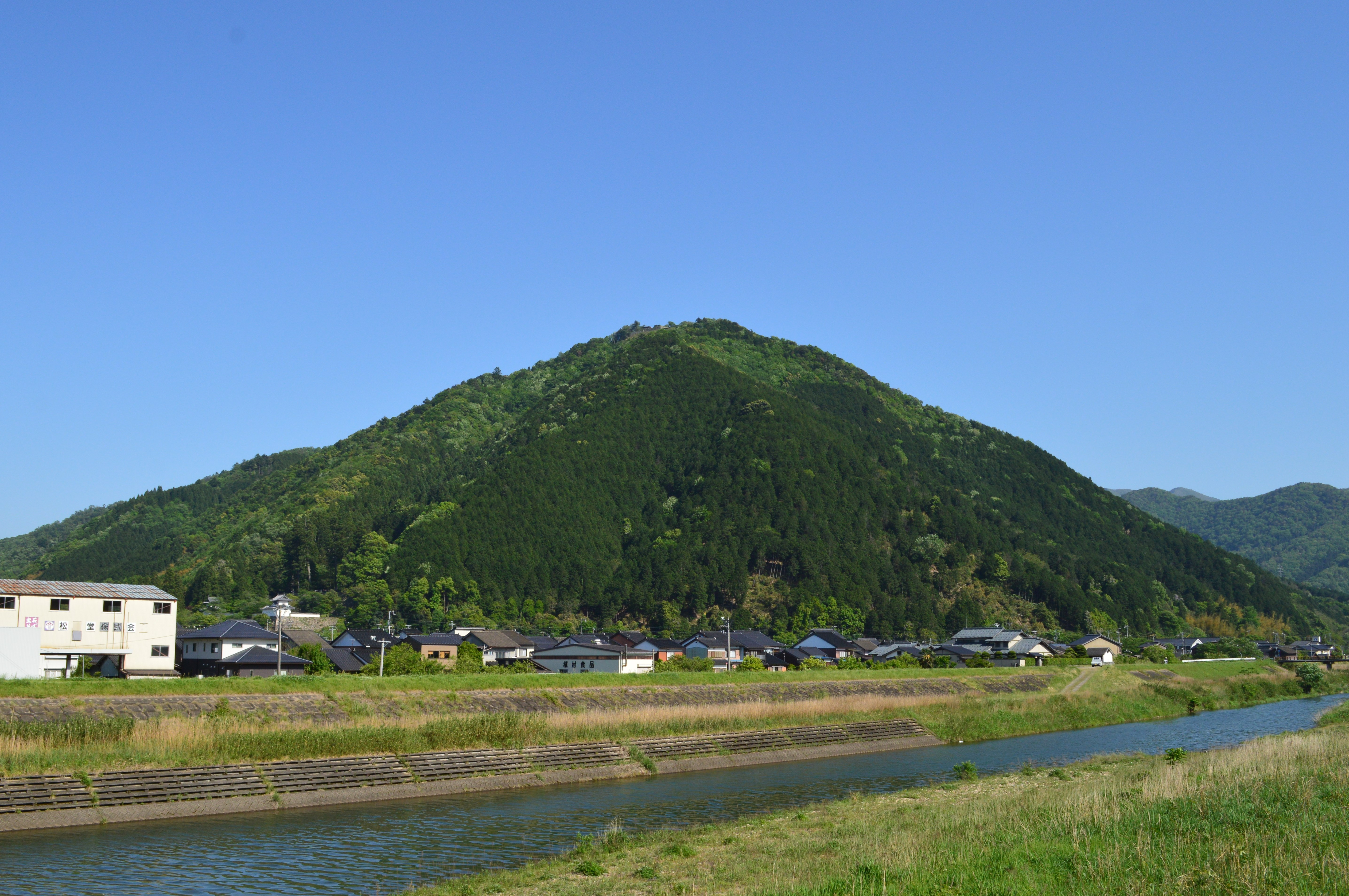 有子山 全景